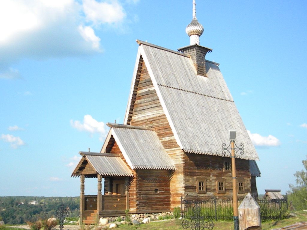 Церковь Воскресения (деревянная) из села Билюкова, 1700 г. (Ивановская область, Плёс, Гора Левитана)